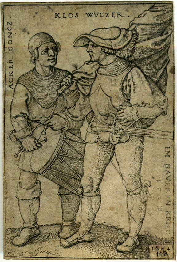 Beham, (Hans) Sebald (1500-1550): Fahnenträger und Trommler. Kupferstich auf Bütten. 1544. 7,2 x 4,9 cm. In der Platte monogrammiert und datiert sowie mit umlaufendem Text „KlosWvczer – Acker Concz im Bavern Krieg 1525”. Pauli/Hollstein 202 II (v. II); Bartsch 199. – Noch sehr guter Druck. Bis an die Einfassungslinie beschnitten.